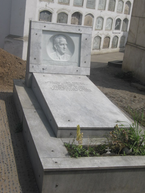 Tumba Ciro Alegria